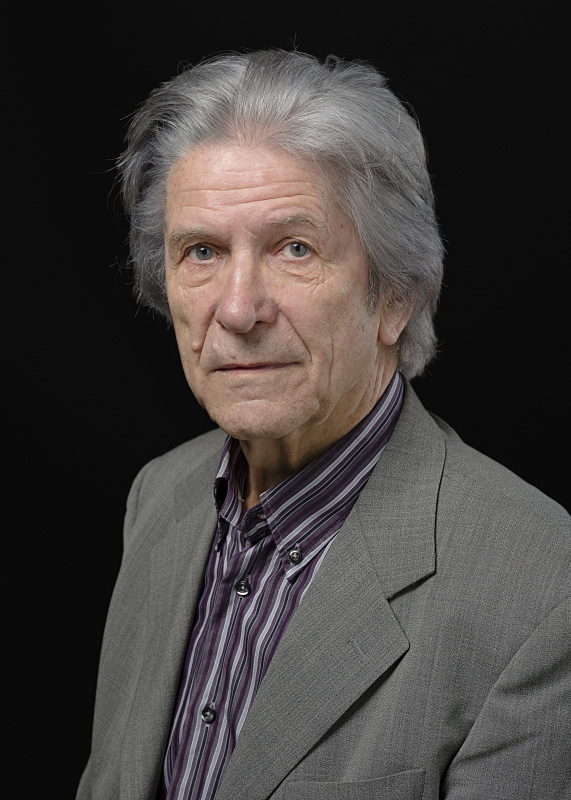 René Falquet, musicien, enseignant, compositeur, naît le 29 novembre 1934 au Pont à la Vallée de Joux. Portrait réalisé à la BCU Lausanne, le 31 mars 2015.